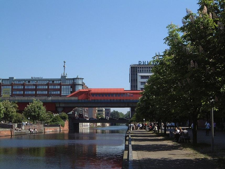 S-Bahn-Station Hammerbrook in Hamburg. Über den Mittelkanal spannt sich die S-Bahnstrecke nach Harburg mit dem Haltpunkt Hammerbrookstraße. Im Vordergrund sieht man bei den Menschengruppen die zu einem Denkmal für die Hammerbrooker Opfer der Bombenangriffe des zweiten Weltkrieges umgebauten Einmündungen der in den 1950er-Jahren zugeschütteten Kanäle Victoriakanal (links) und Gustavkanal (rechts).